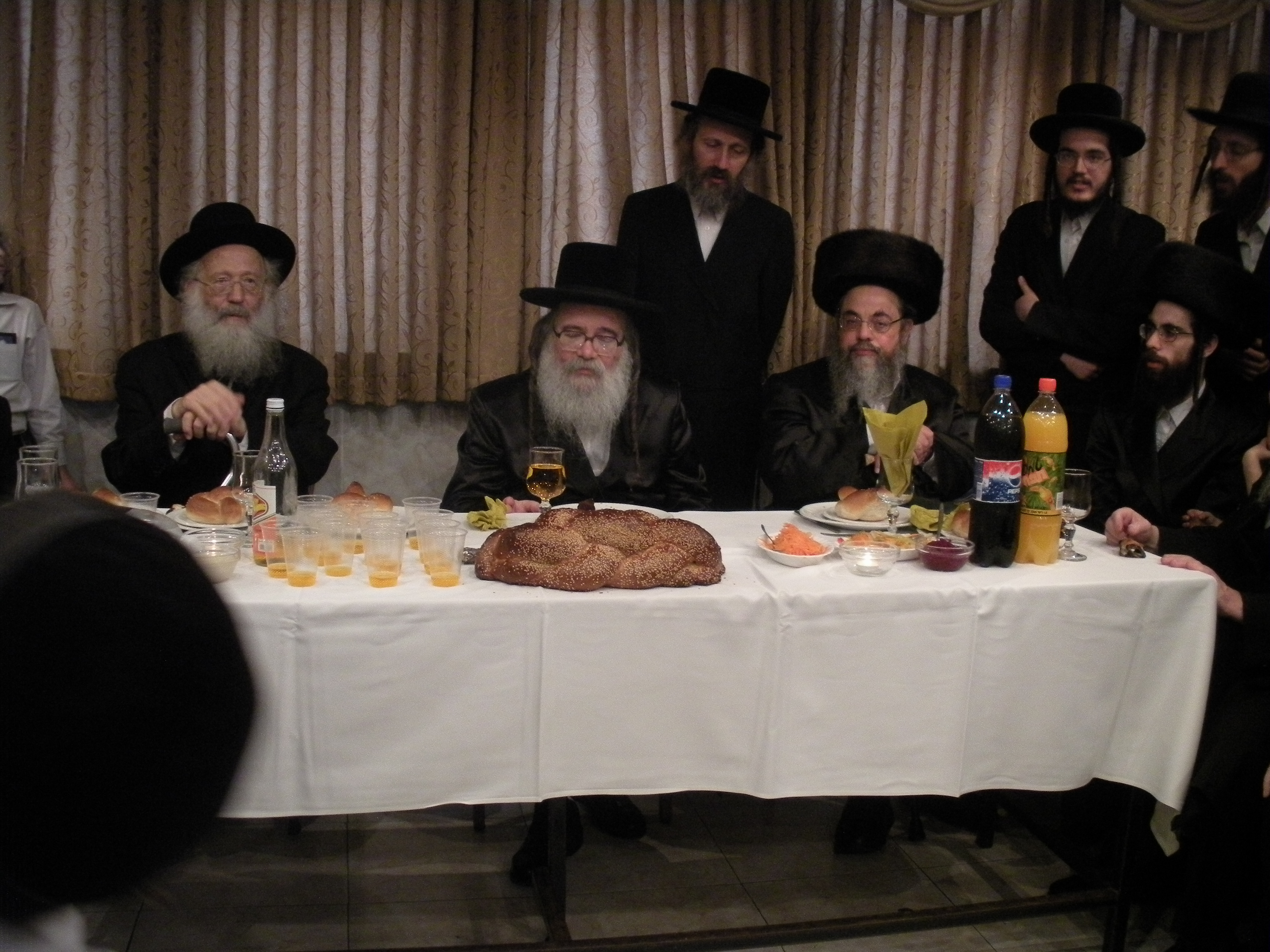 בברית מילה לנכדו